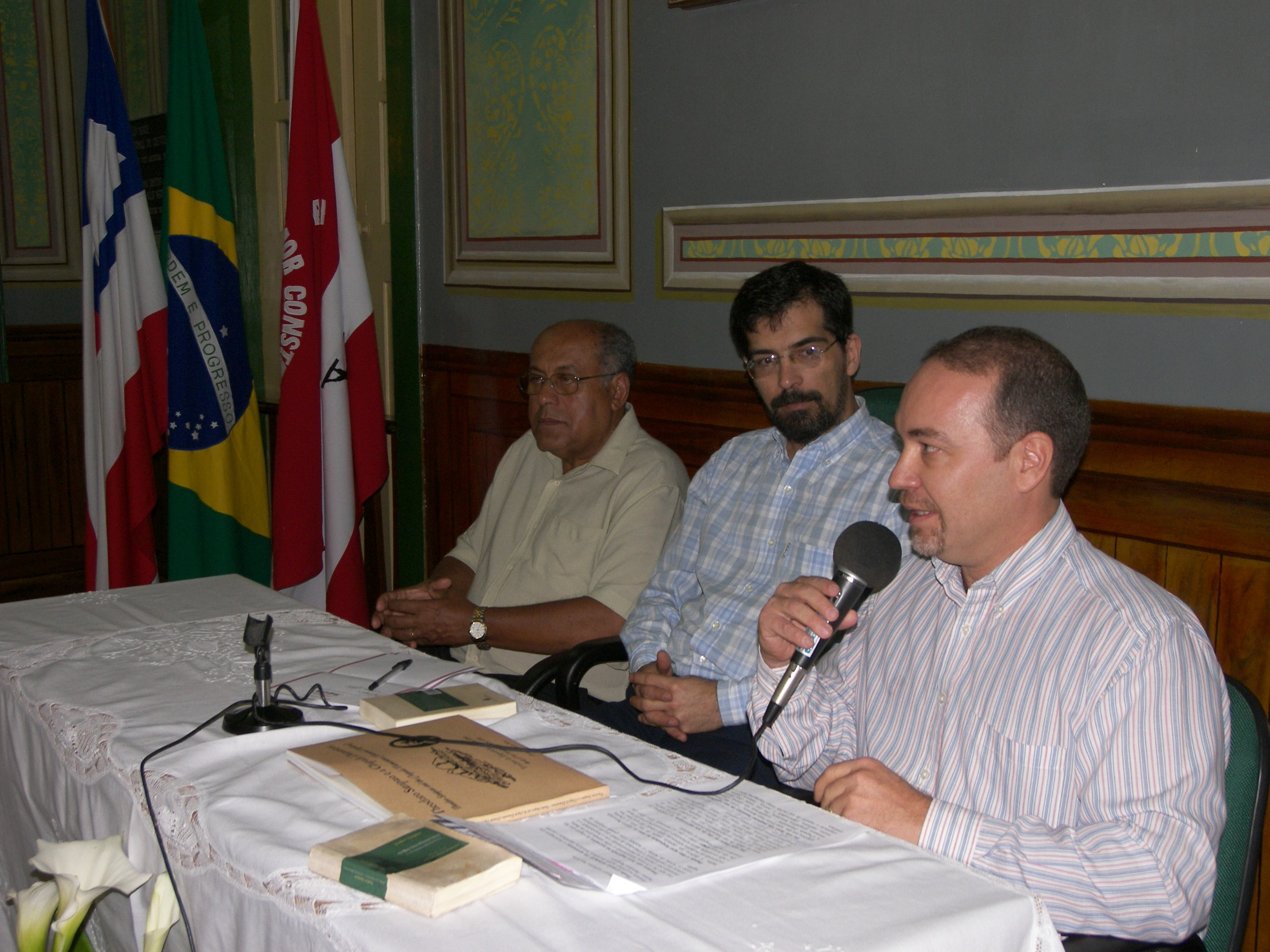 O pintor e escritor brasileiro Otoniel Fernandes Neto no lançamento de sua obra "Teodoro Sampaio e a Chapada Diamantina, na Academia Caetiteense de Letras, em 2006, ao lado do então presidente André Koehne e do acadêmico Benedicto dos Santos.